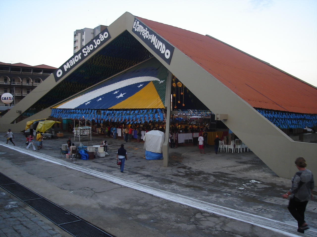 Pirâmide do Parque do Povo, Campina Grande - PB Ano: 2006. Author: Bruno Coitinho Araújo